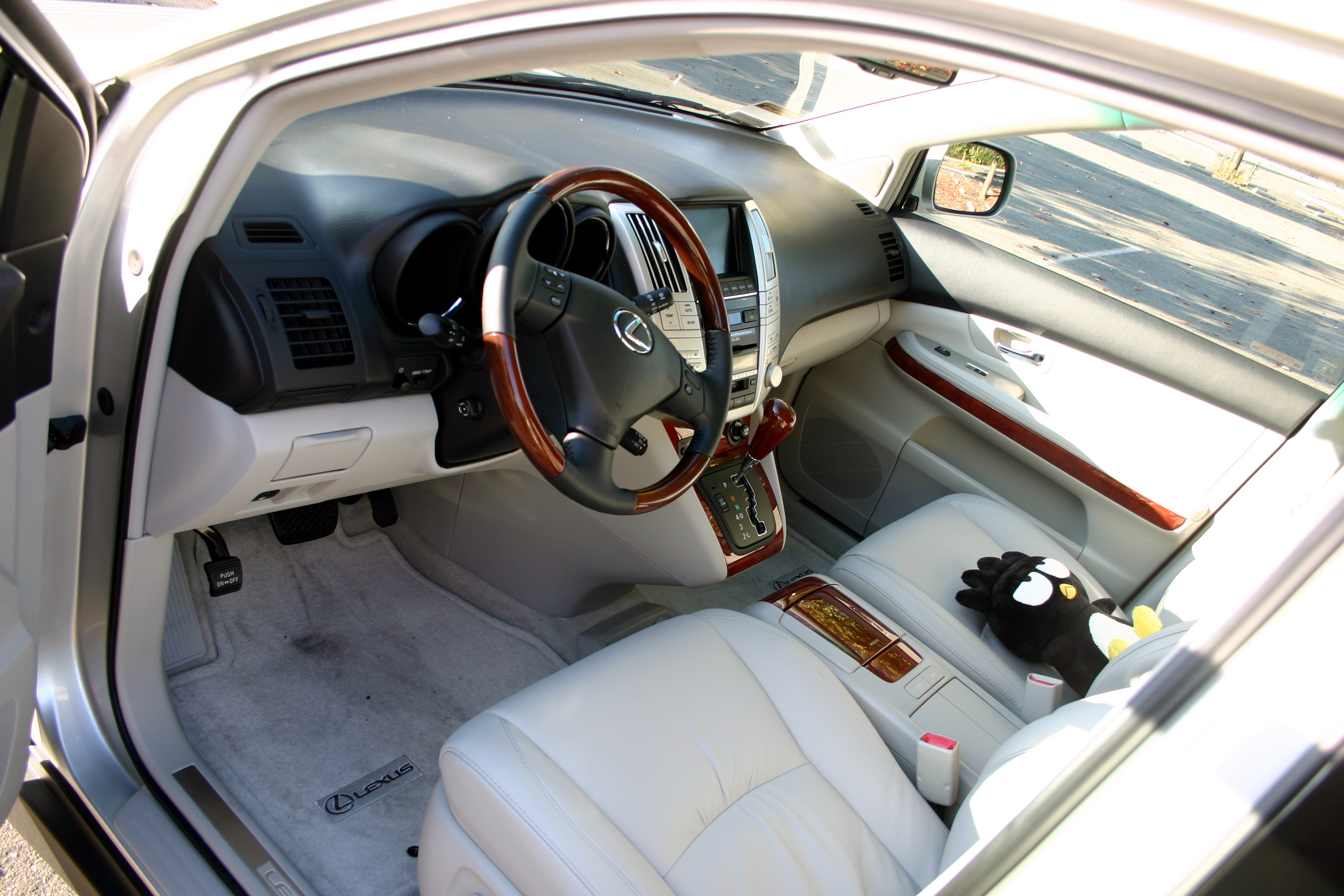 2007 Lexus RX350